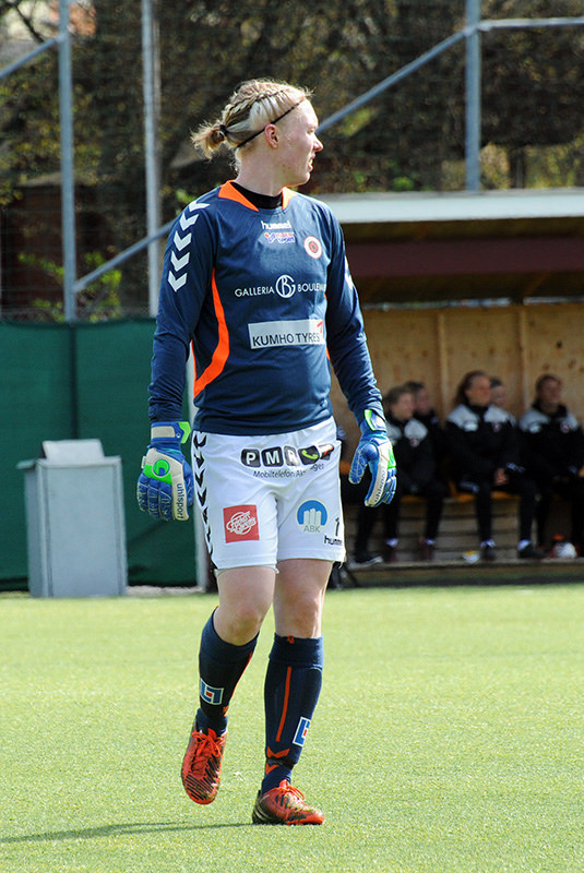 Hedvig Lindahl keeping goal for Kristianstads DFF in May 2014